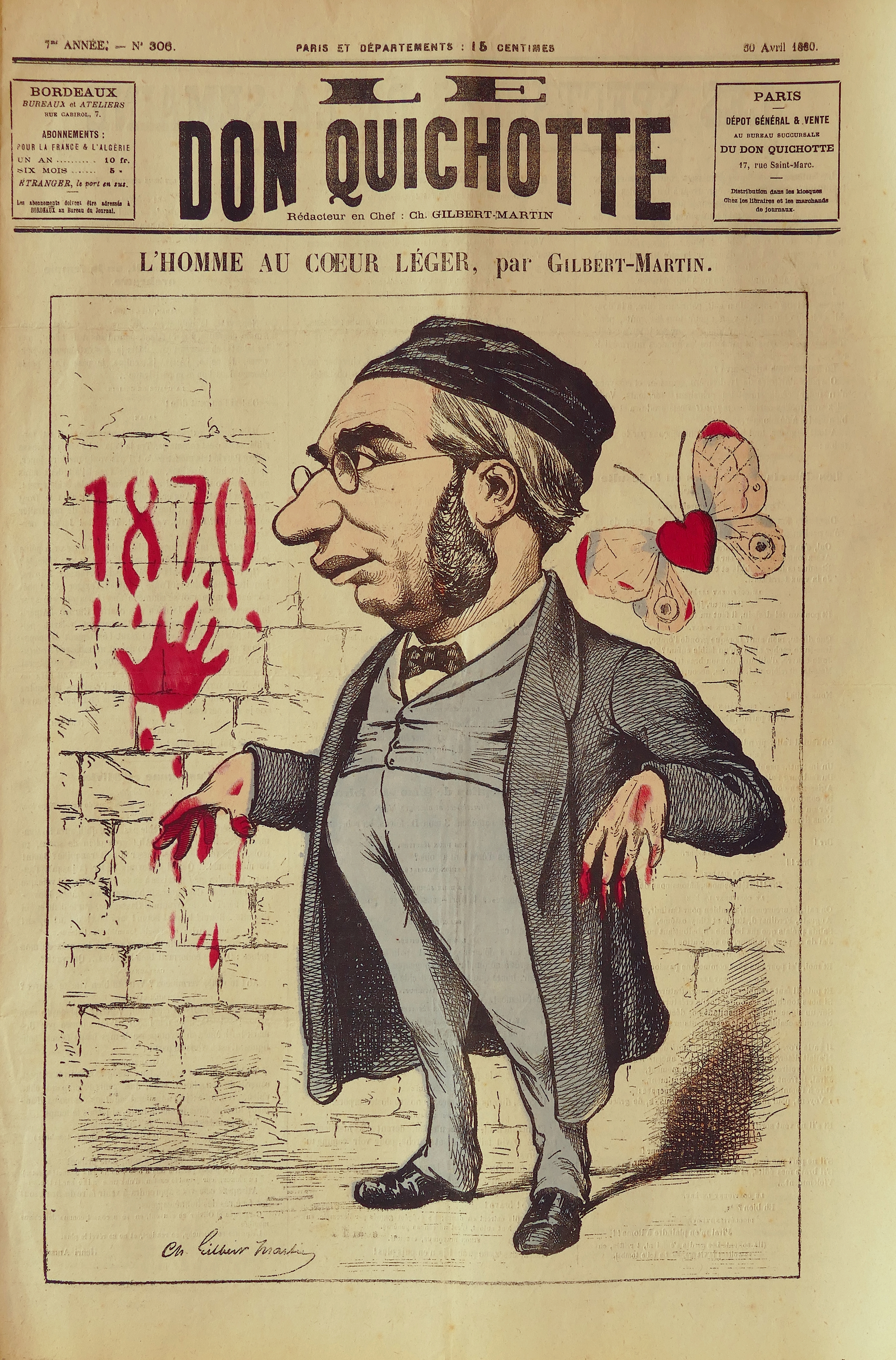 Le Don Quichotte n°306 du 30 avril 1880, Émile Ollivier (L'Homme au cœur léger), dessin de Charles Gilbert-Martin. Dimensions originale : 33,5 x 48,5 cm.